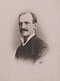 Foureau Fernand (1850-1914) vers 1890-1900, explorateur français. Photo de Lucien Walery (1863-1935)